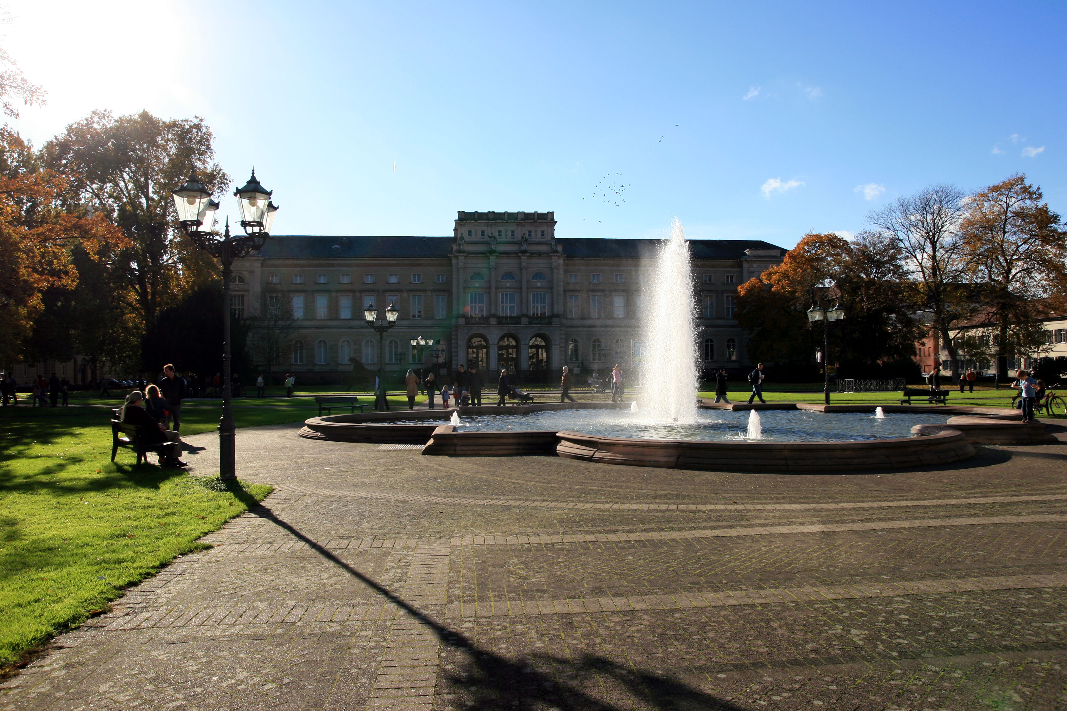 Brunnen am Friedrichsplatz vor dem Naturkundemuseum in Karlsruhe, Herbst 2006